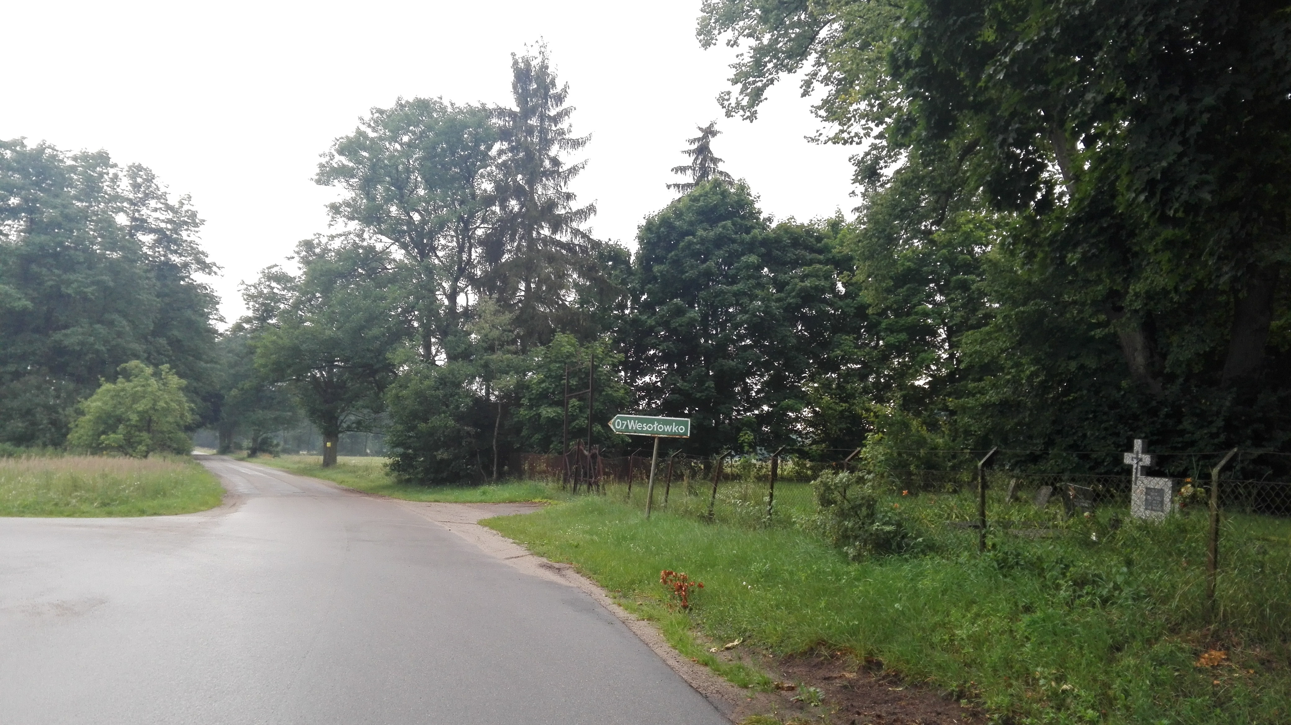 Wesołowo - stary cmentarz ewangelicki z zabytkową żeliwną bramą i kilkudziesięcioma zachowanymi nagrobkami sprzed wojny I kilkoma powojennymi.